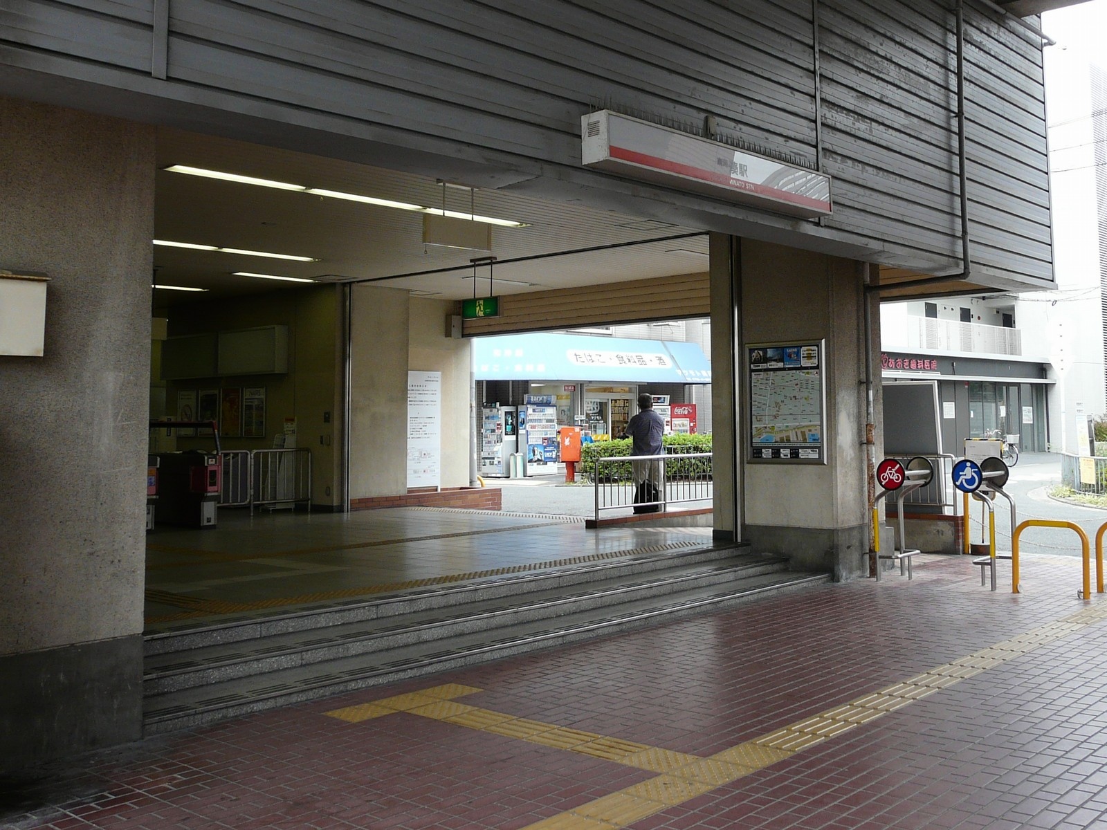 湊駅 Category:鉄道駅画像Category:南海電気鉄道の画像Category:堺市の画像